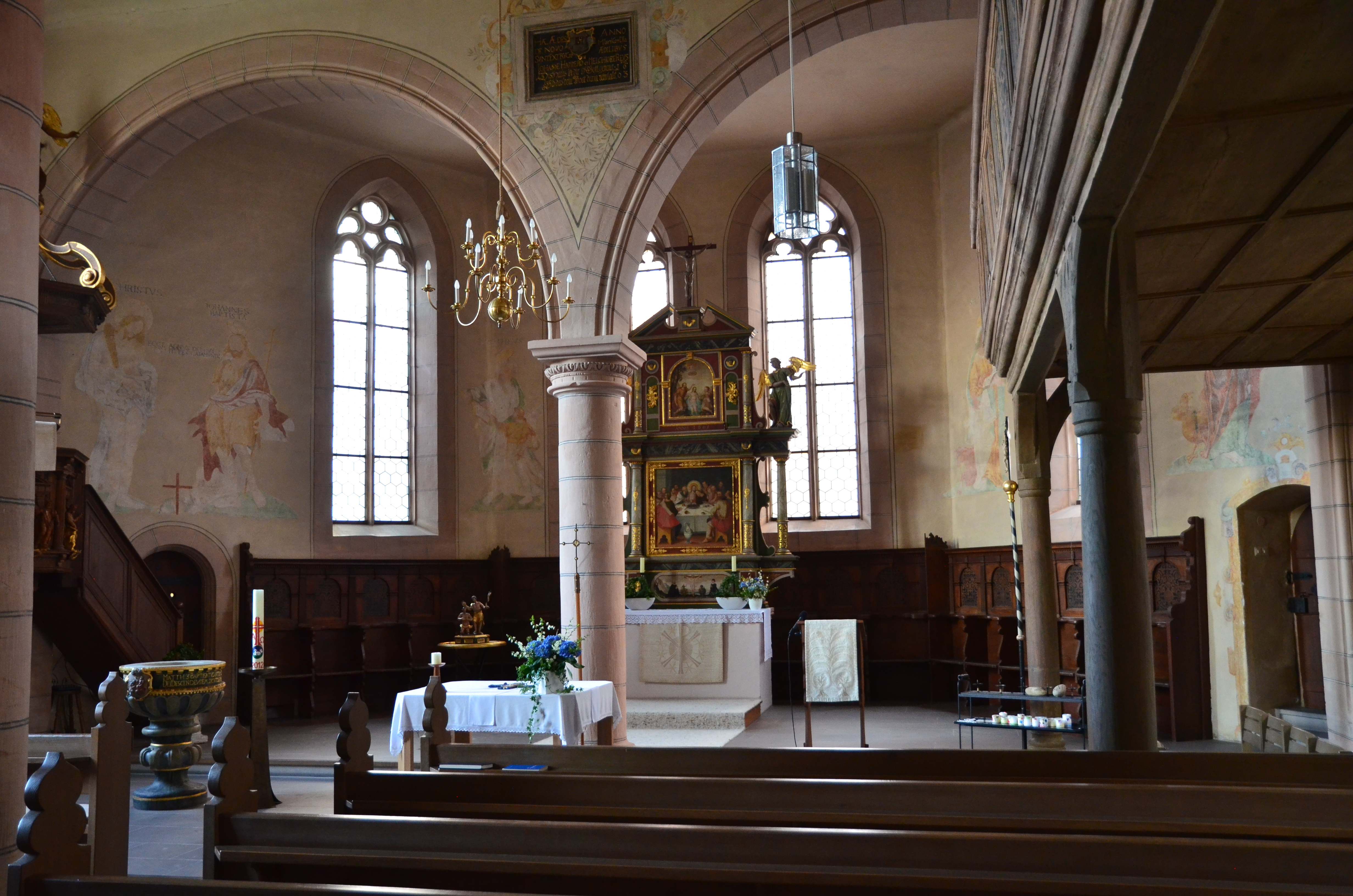 evang.-luth. Kirche Zum Heiligen Kreuz in Wiesenbronn